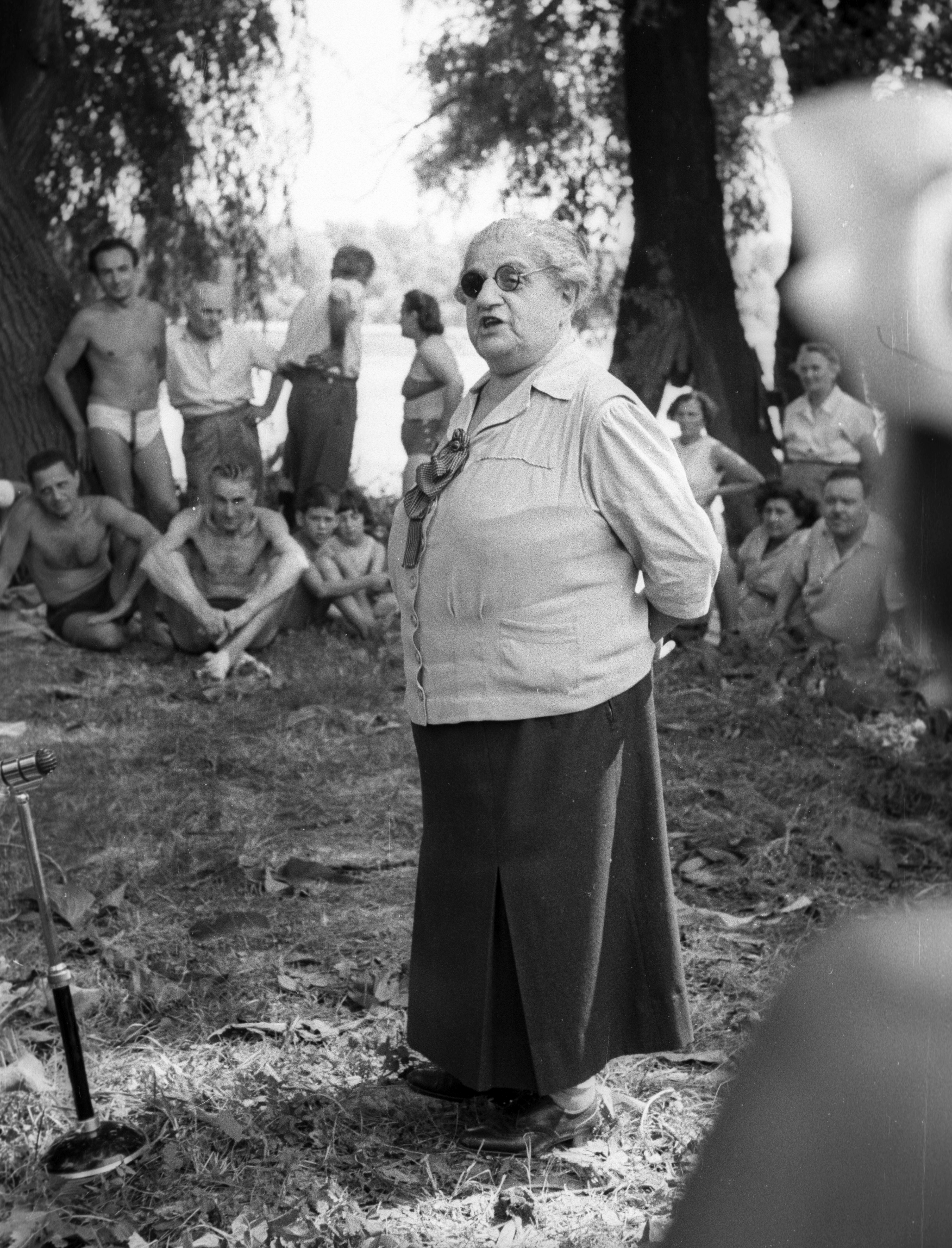 Gárdos Mária (eredeti neve: Grünfeld Mariska) (Pintér Györgyné) (Nagyberény, 1885. október 1. – Budapest, 1973. január 23.) magyar írónő, újságíró, a szocialista nőmozgalom egyik vezetője.